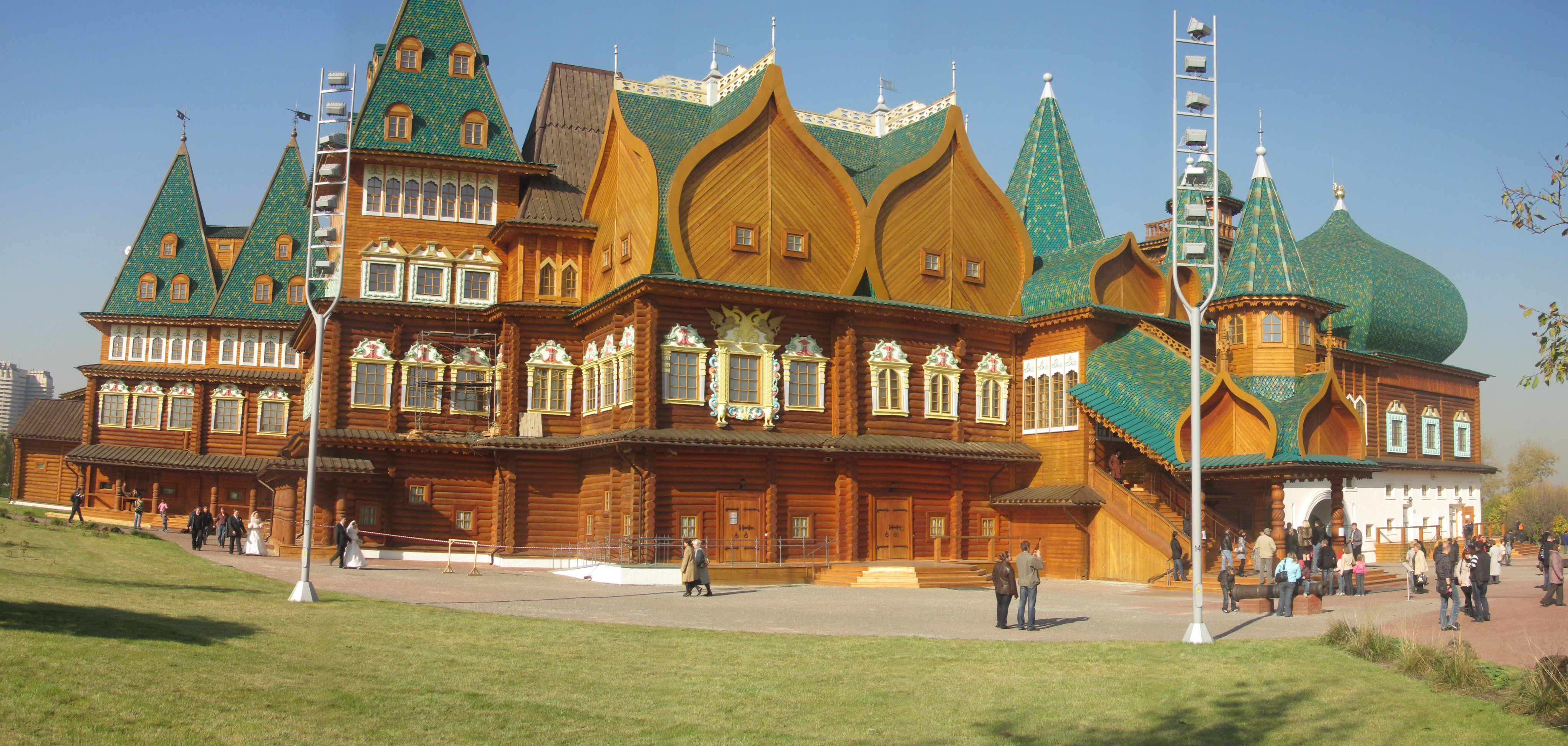 дворец царя Алексея Михайловича